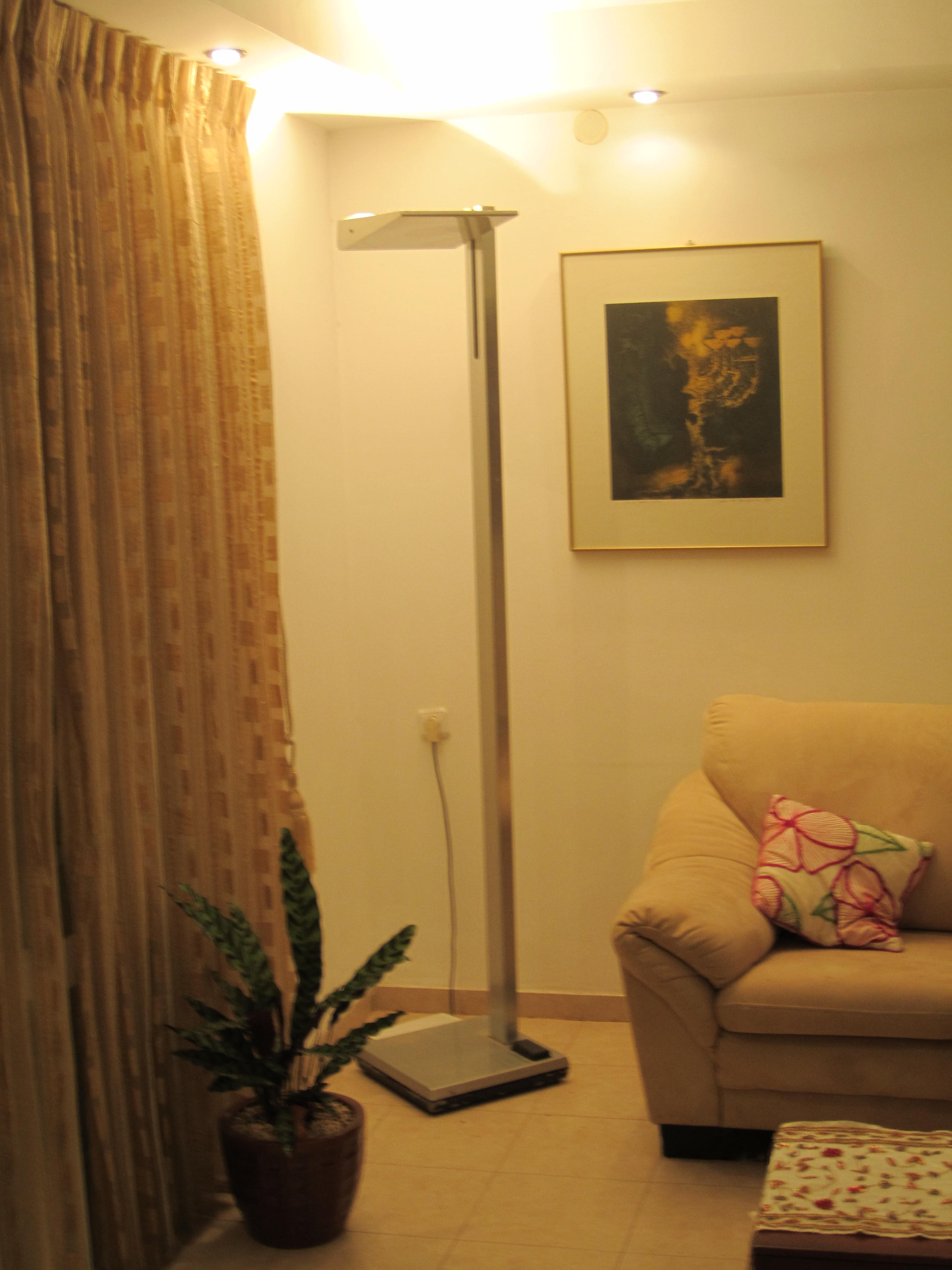 Aparelho de iluminaçao de interiores, autoria de Lîvio Levi